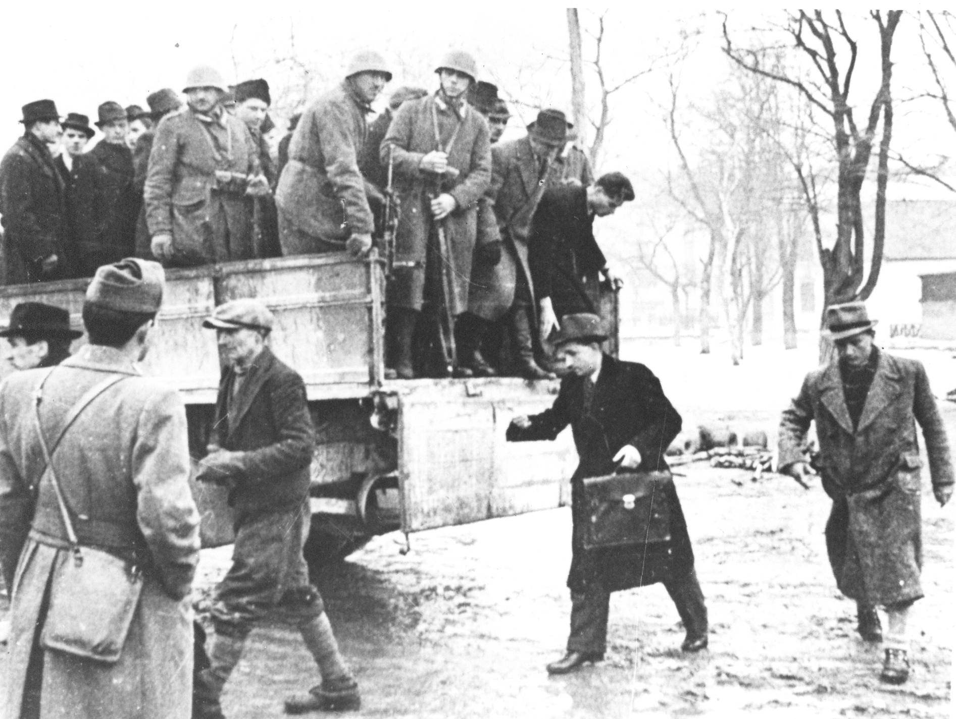 Racije Italijanov v Ljubljani leta 1942.